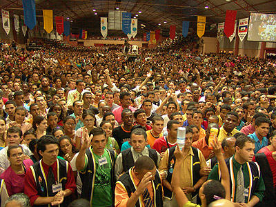 Congresso Internacional de Missões dos Gideões Missionários da Última Hora, Brasil